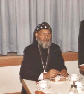 Archbishop Cyril Mar Baselios Malancharuvil von Trivandrum, 1935-2007